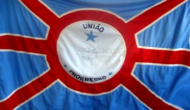 BANDEIRA DA CIDADE DE GLAUCILÂNDIA- MINAS GERAIS